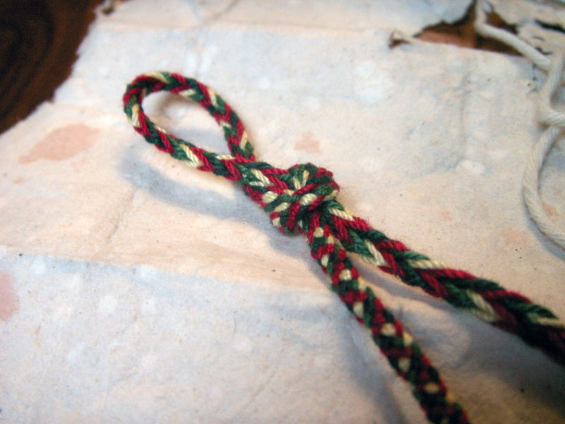 Handgemachtes Nestelband in Fingerschlaufenwebtechnik mit 5 Schlaufen. Vorder- und Rückseite des Bildes sichtbar.